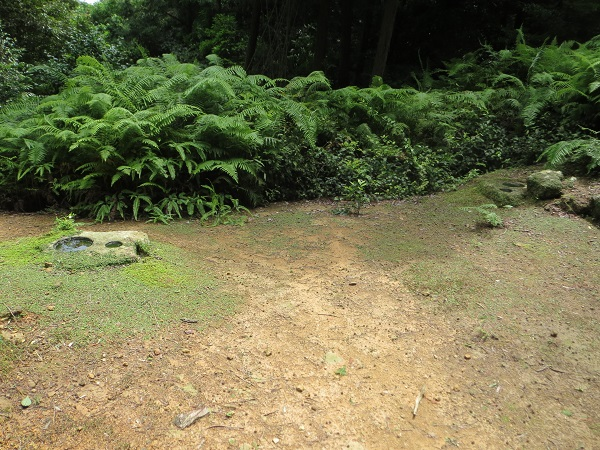 ビングシ門跡